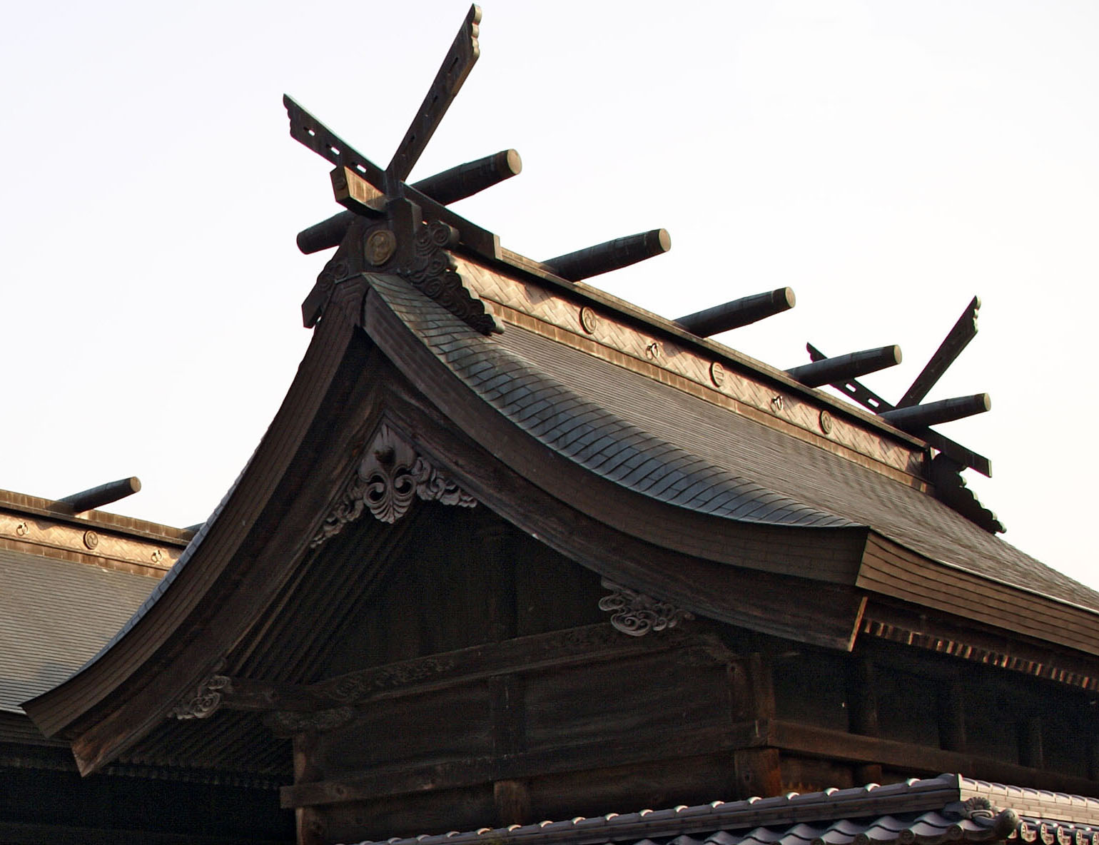 Sumiyoshi-jinja in Kasai, Hyogo, Japan